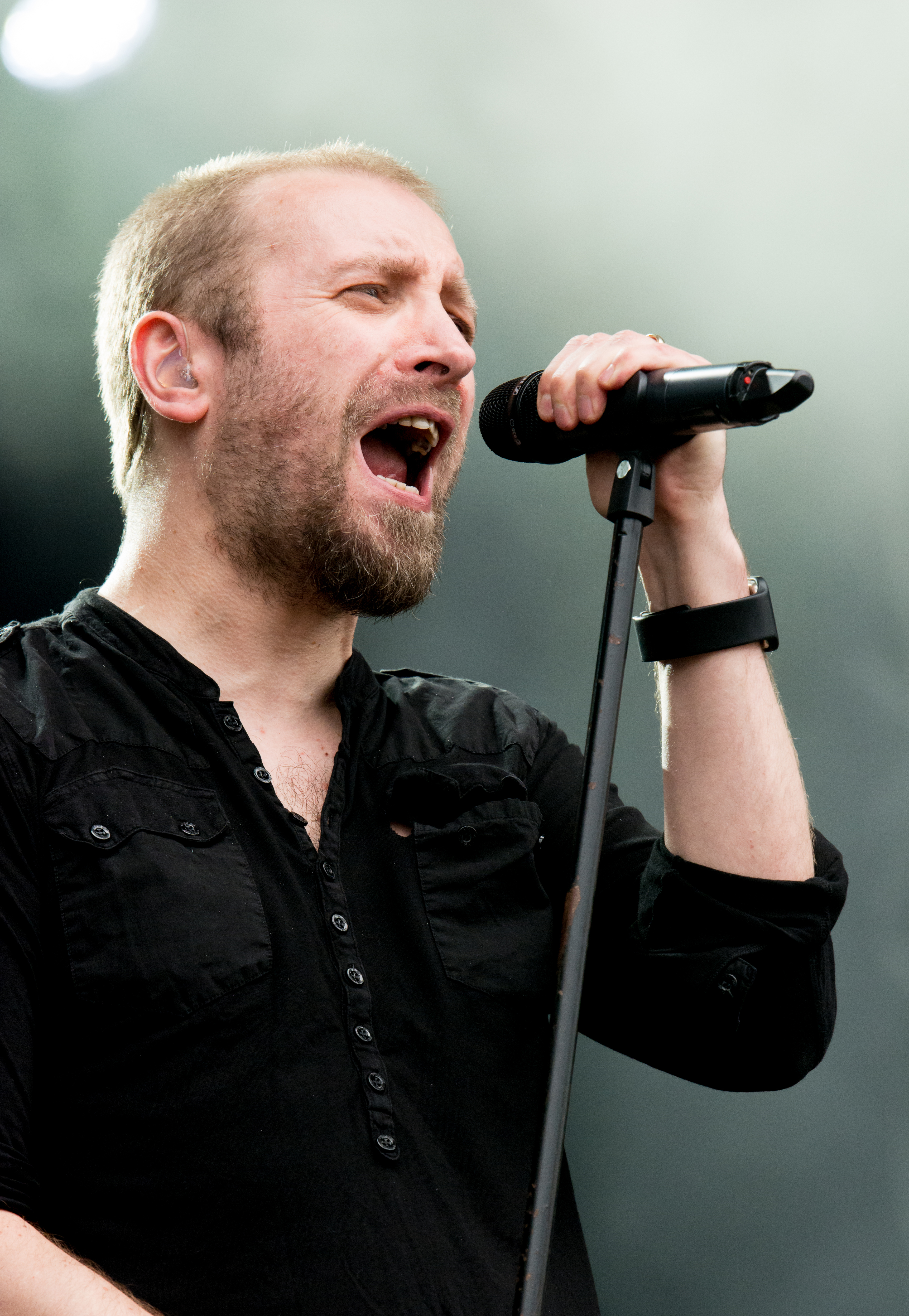 Paradise Lost auf dem Elbriot 2016